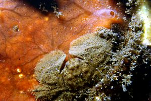 Porcellana platycheles